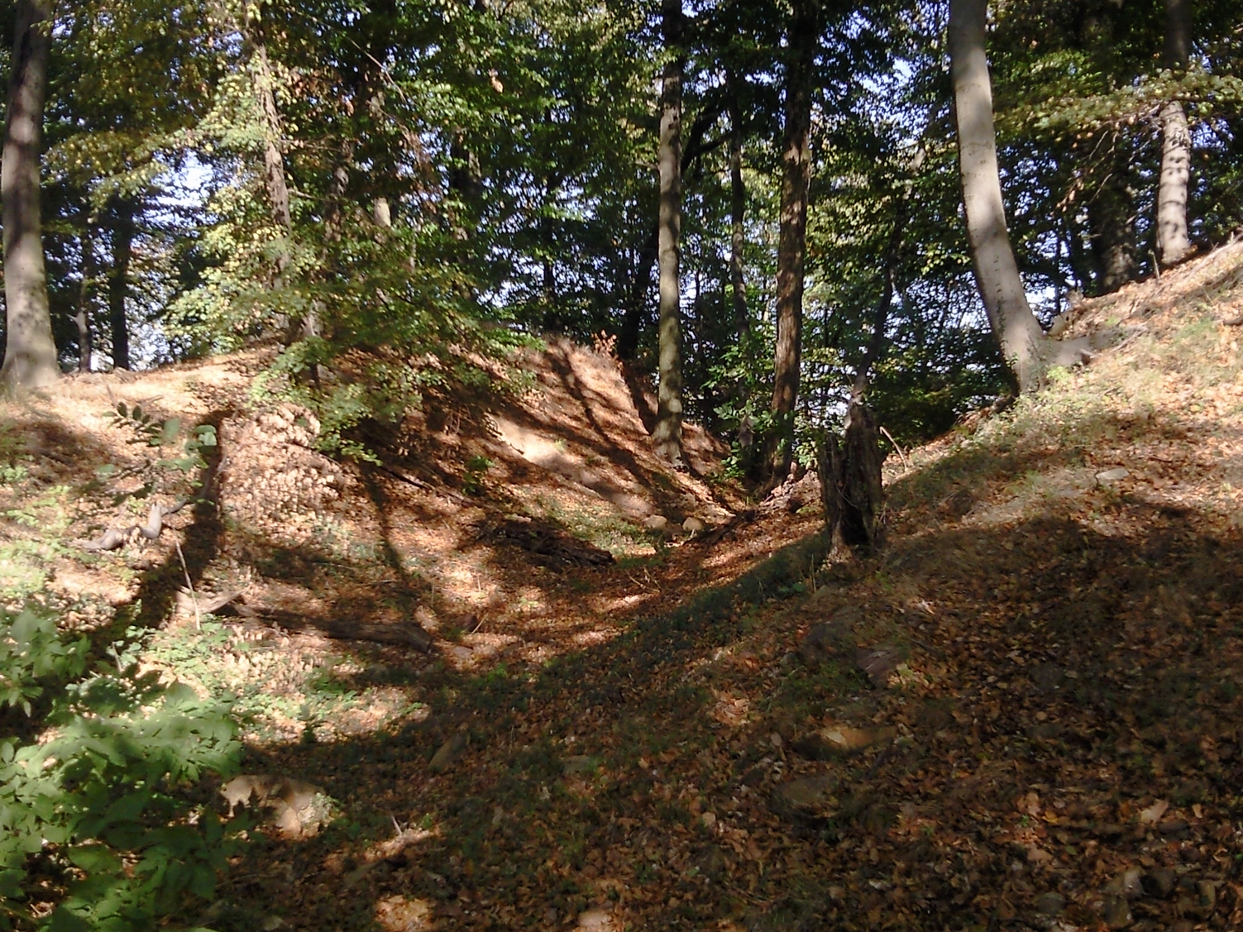 Die Reste der Burg Jossa im Herbst 2011 - Wallgraben